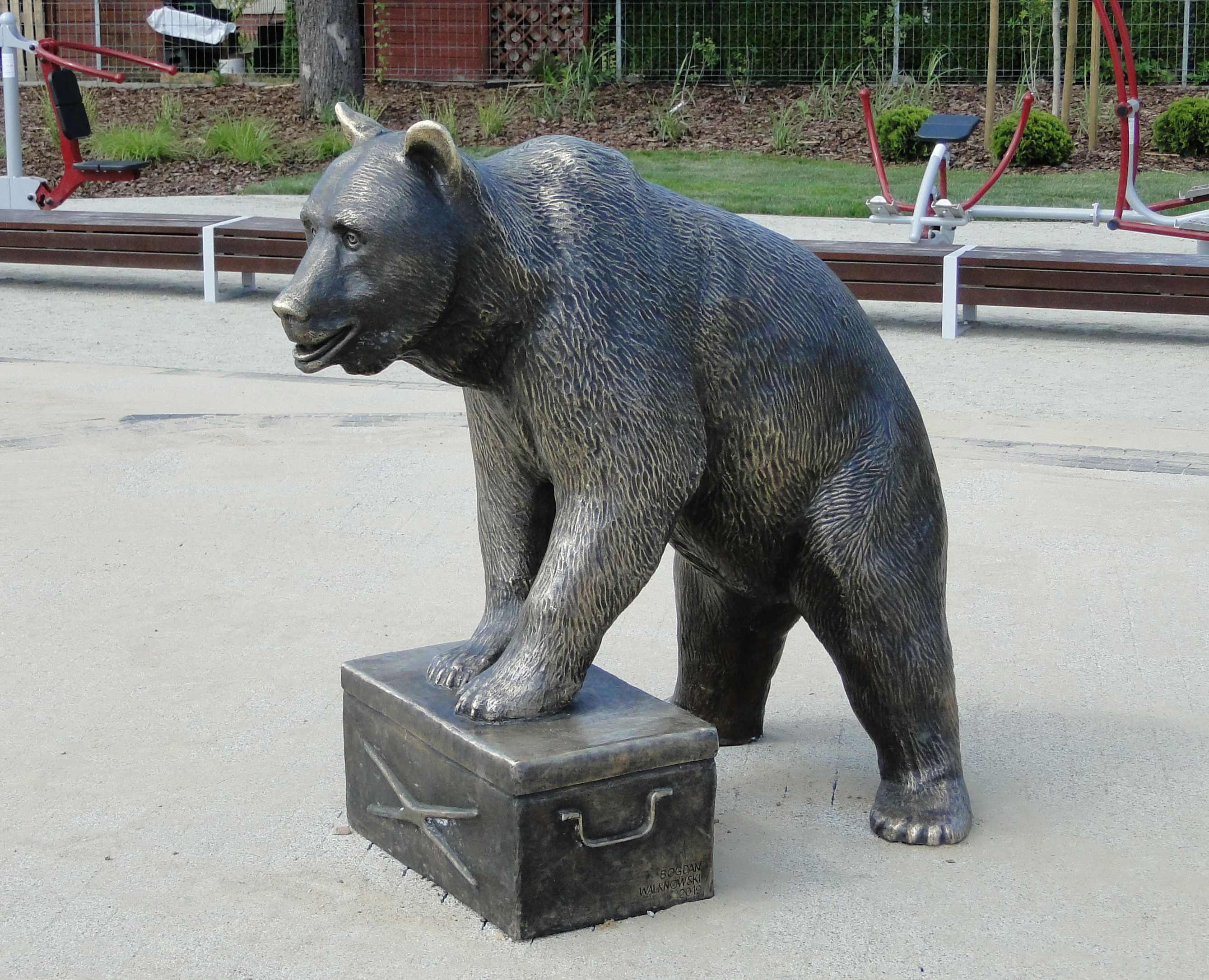 Pomnik Misia Wojtka na Skwerze Misia Wojtka w Szczecinie (autor: Bohdan Ronin-Walknowski)